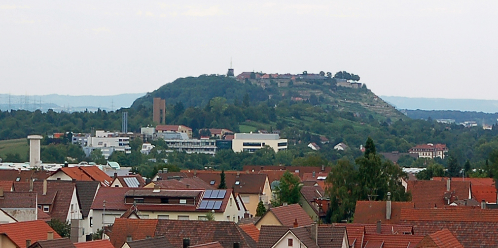 Behindertenschule, Rehaklinik und Heim auf der Hurst vor dem Asperg – vom Oberen Torturm in Markgröningen